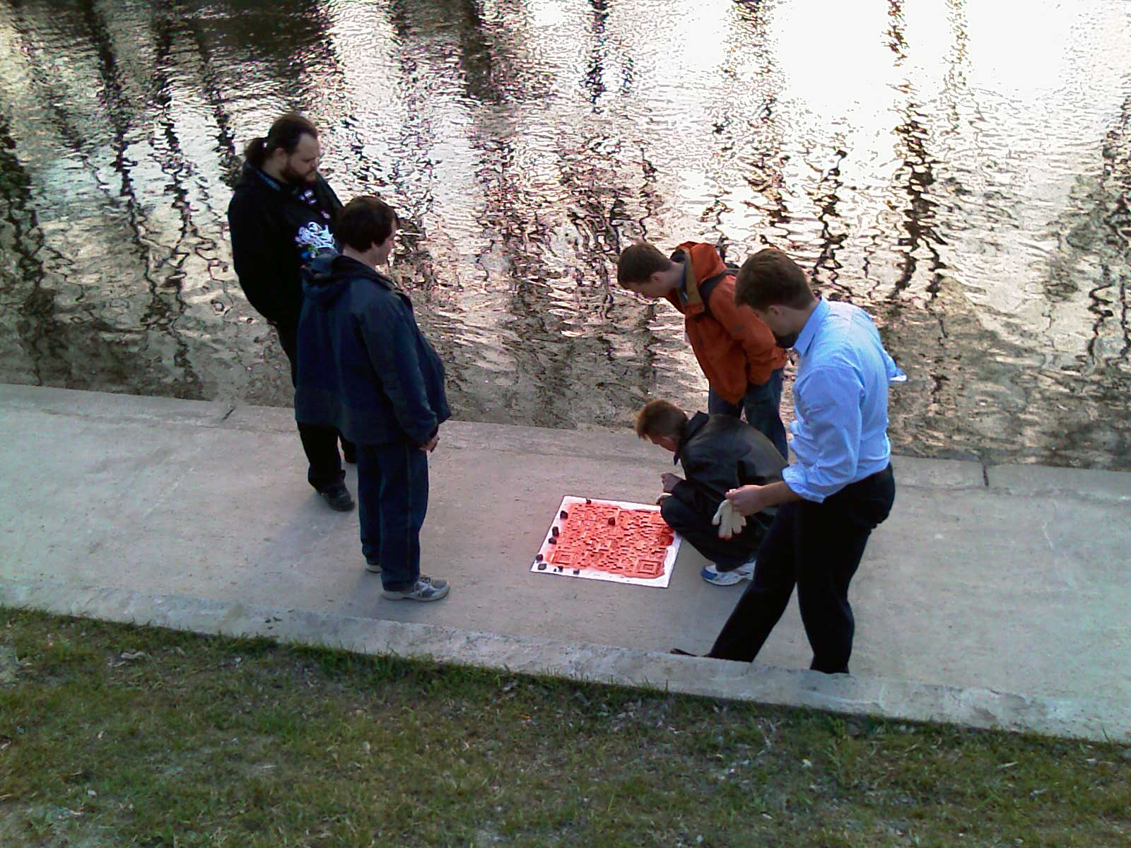 Дмитрий Калаев и единомышленники рисуют первый пункт на маршруте Красная линия (Екатеринбург) в рамках субботника на Памятник клавиатуре (весь альбом)